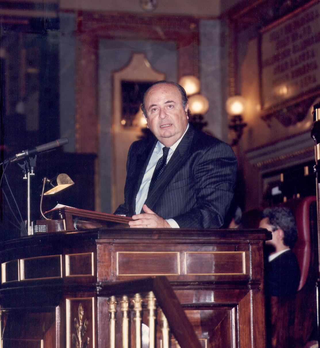 Intervenció del Diputat J. A. Montesinos en el Ple del Congrés. 1990